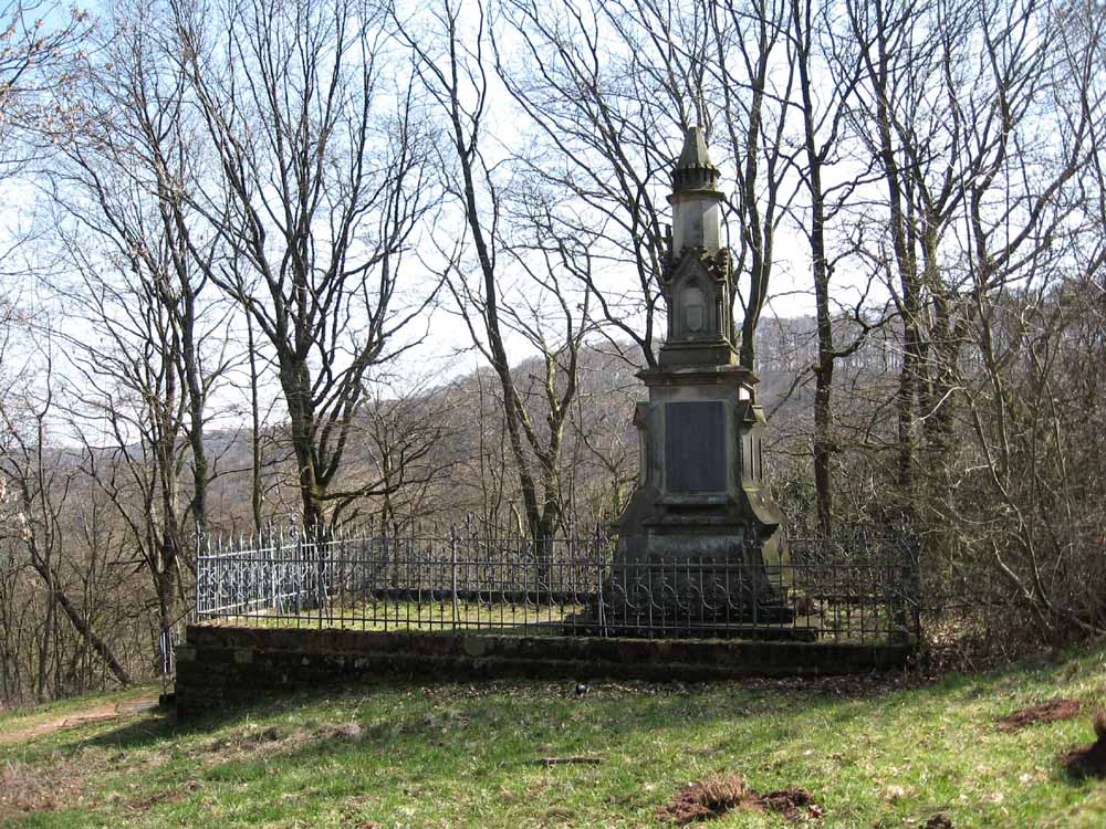 Ehrenmal für das 5. Brandenburgische Infantrie-Regiment Nr. 48 „Von Stülpnagel“ in Spicheren